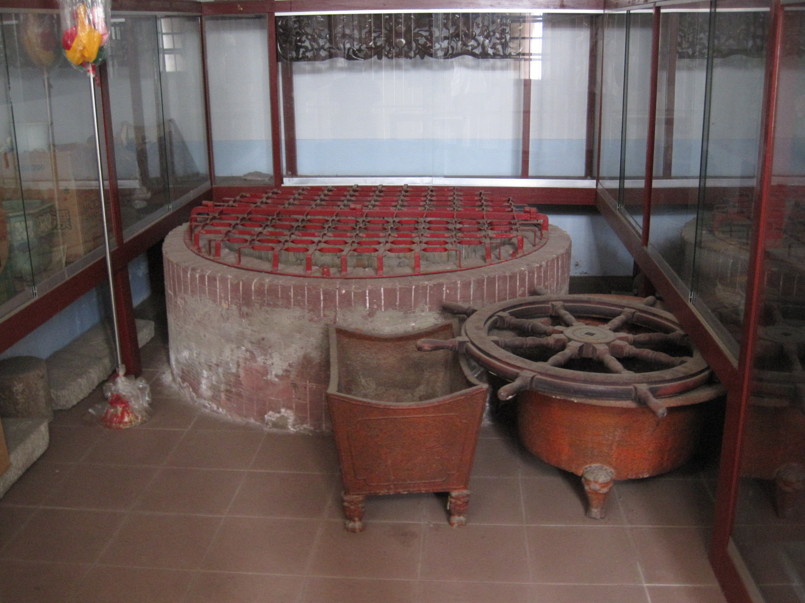 臺南開元寺鄭經井。